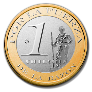 Logo de la Criptomoneda Chilcoin